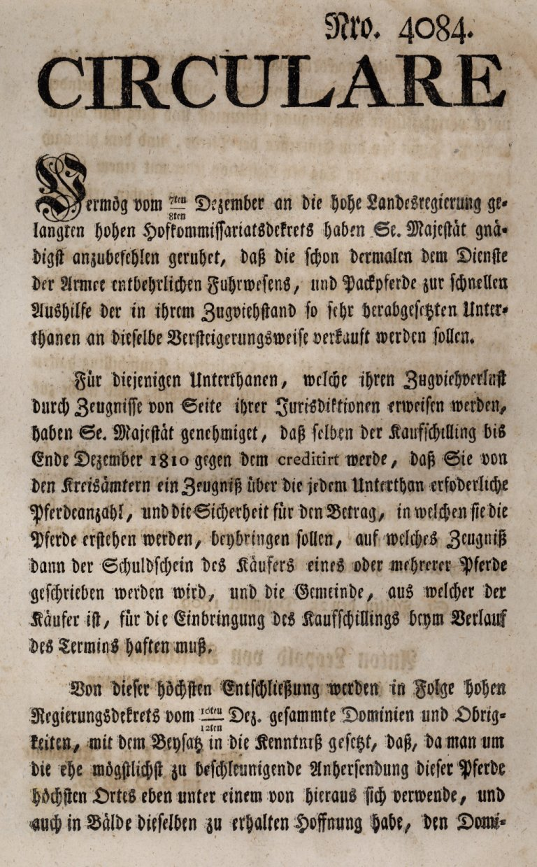 Amtsschreiben von 1809, selbst gescannt